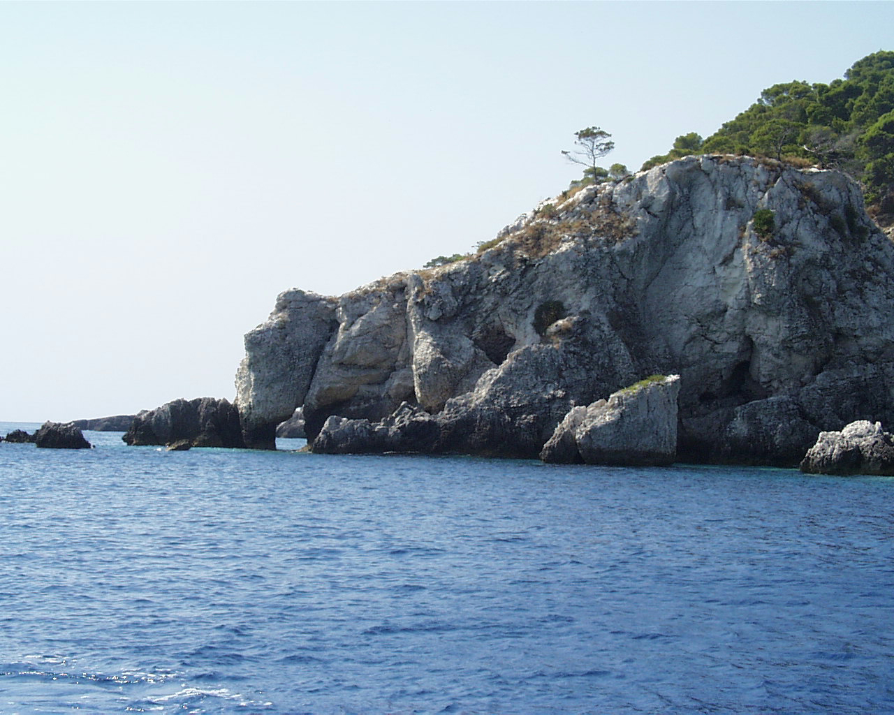 Der Elefant aus Stein